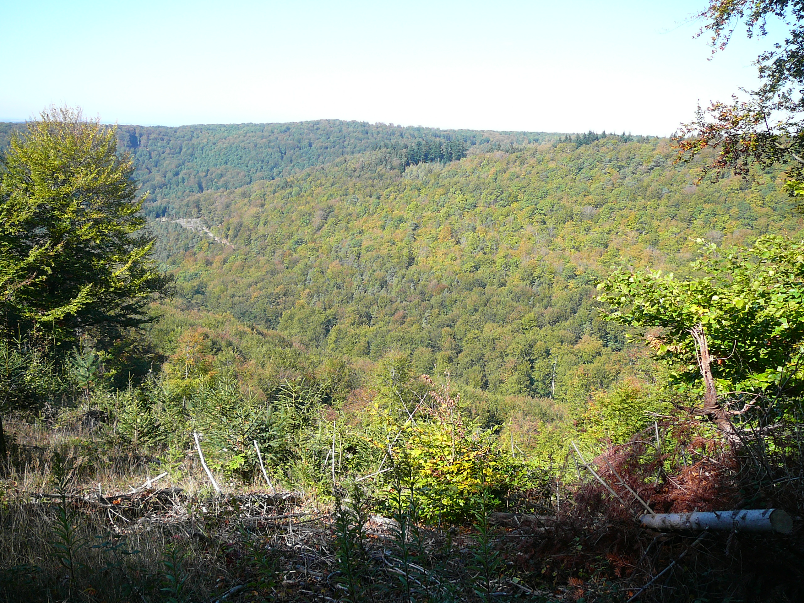 Blick über das obere Wartenbachtal zum Winschertberg